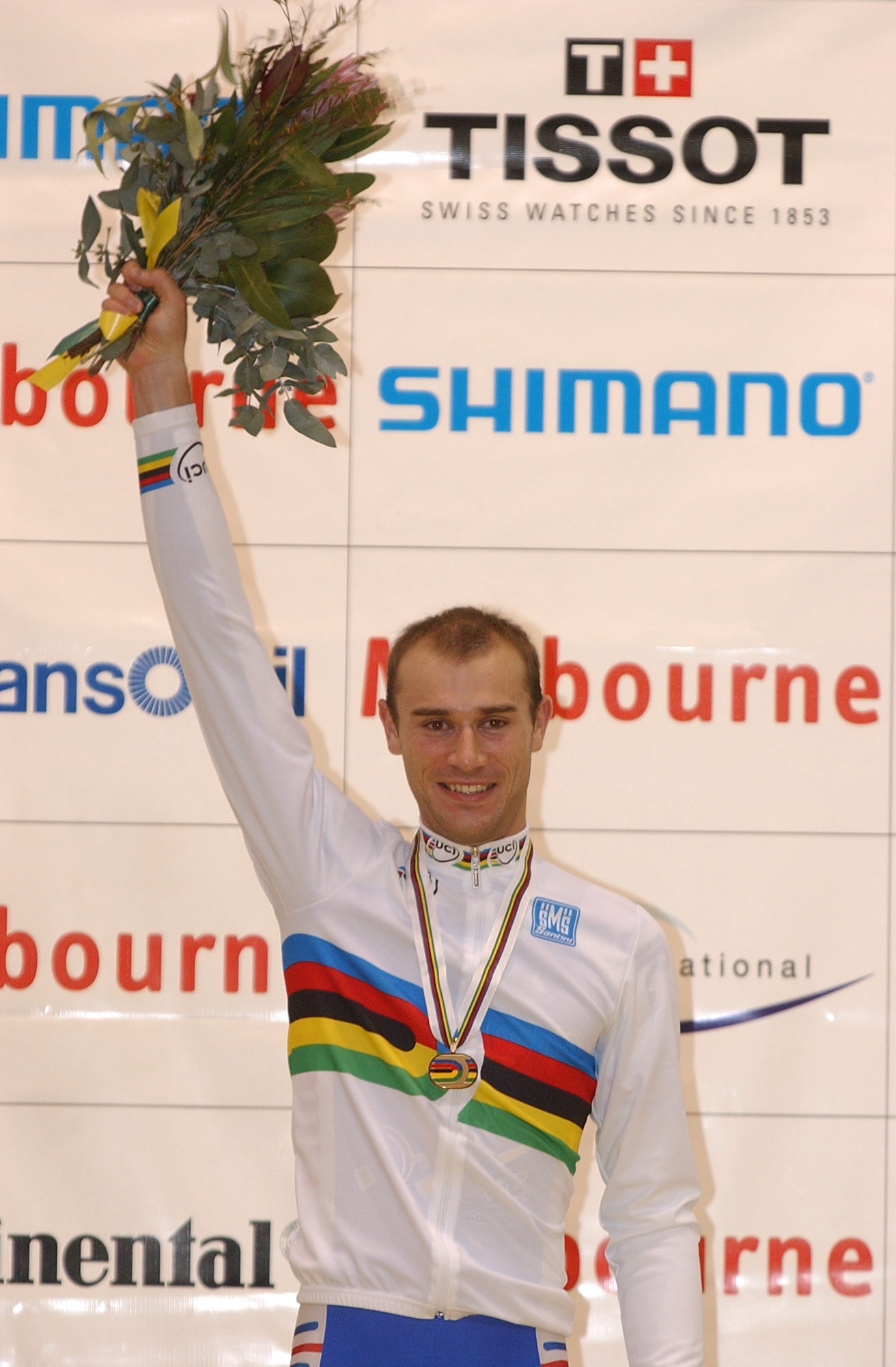 Franck Perque podium championnat du monde de la course aux points 2004